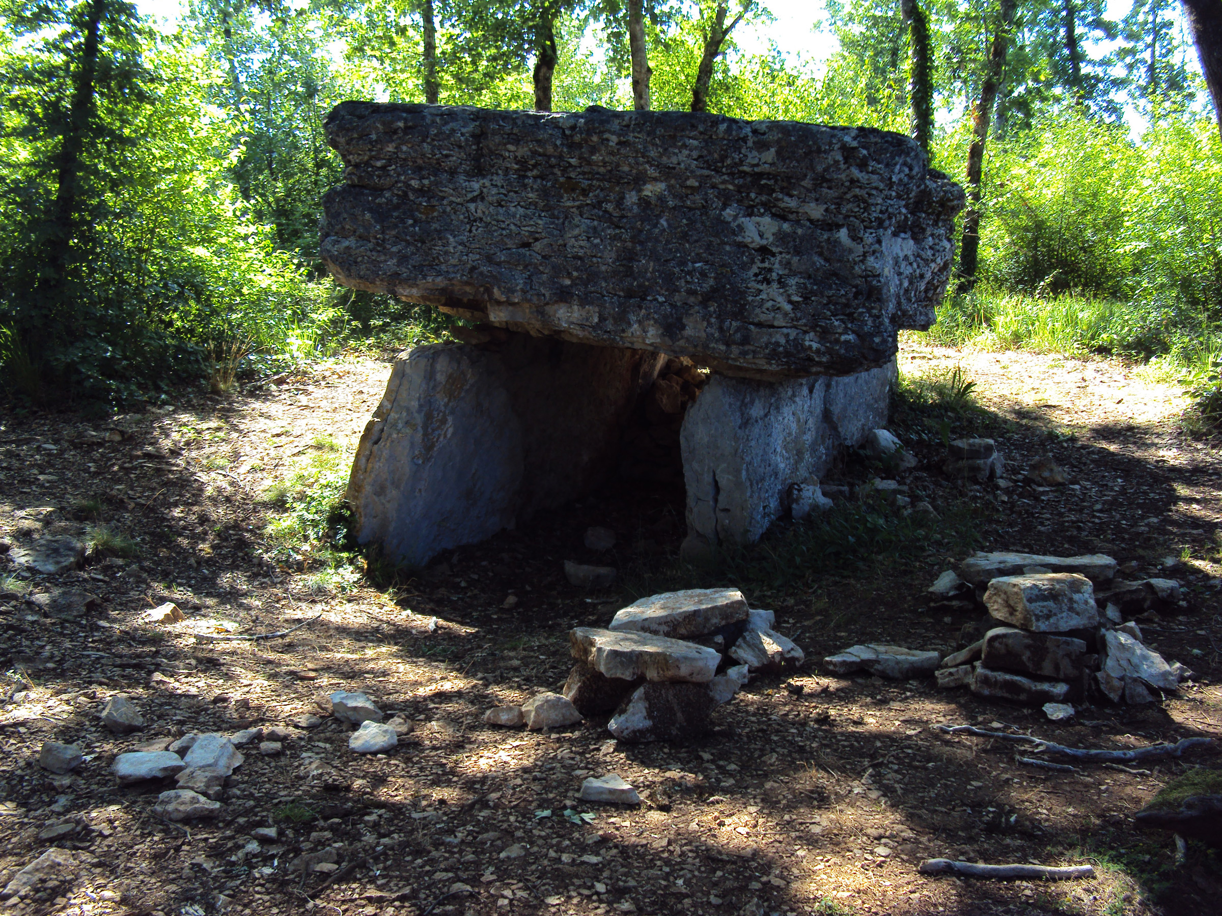 Dolmen du Lac d'Aurie dit du "Pech Lapeyre" près de Limogne en Quercy (03) Ænglisc: The Dolmen of the Lac d'Aurie near the village of Limogne en Quercy (03)